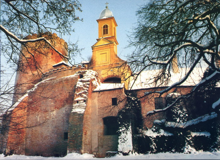 Poged iz vanjskog opkopa na zidine, kapelu i kulu dvorca Prandau-Normann u Valpovu